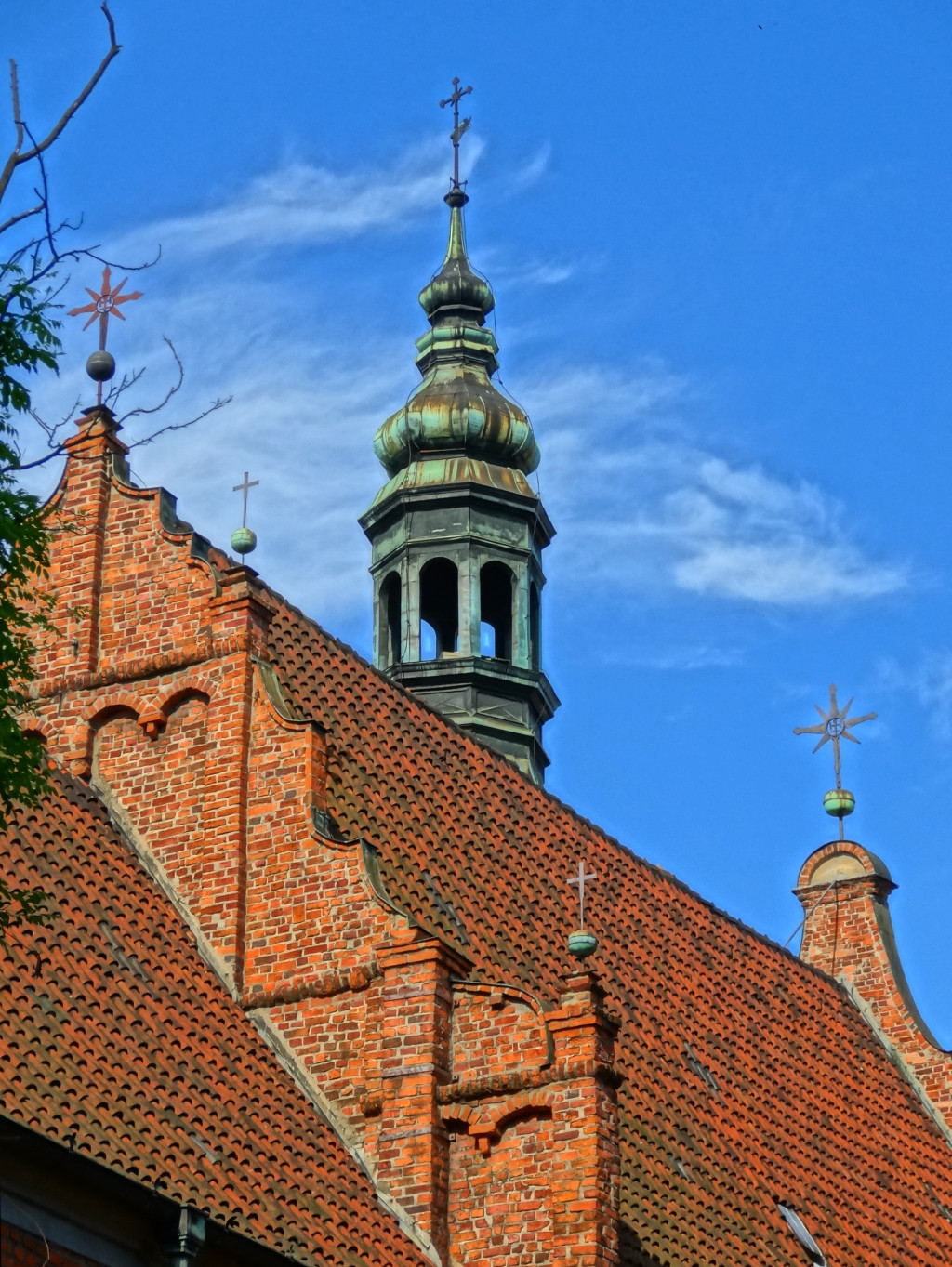 Kościół p.w. Wniebowzięcia Najświętszej Marii Panny w Bydgoszczy (zbud. 1582-1615, do 1835 r. kościół klasztorny klarysek bydgoskich)